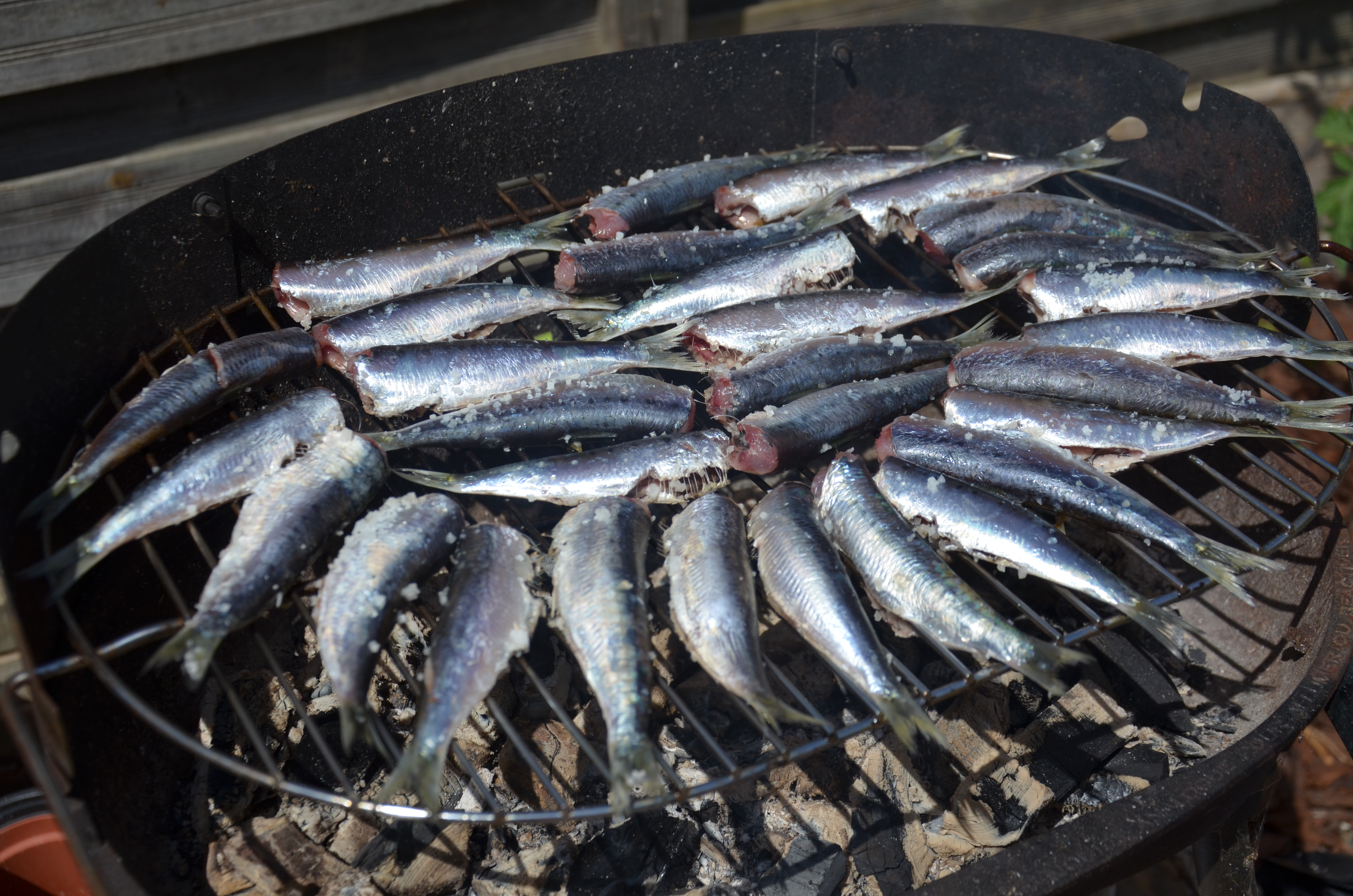 Cuisson de sardines au barbecue.